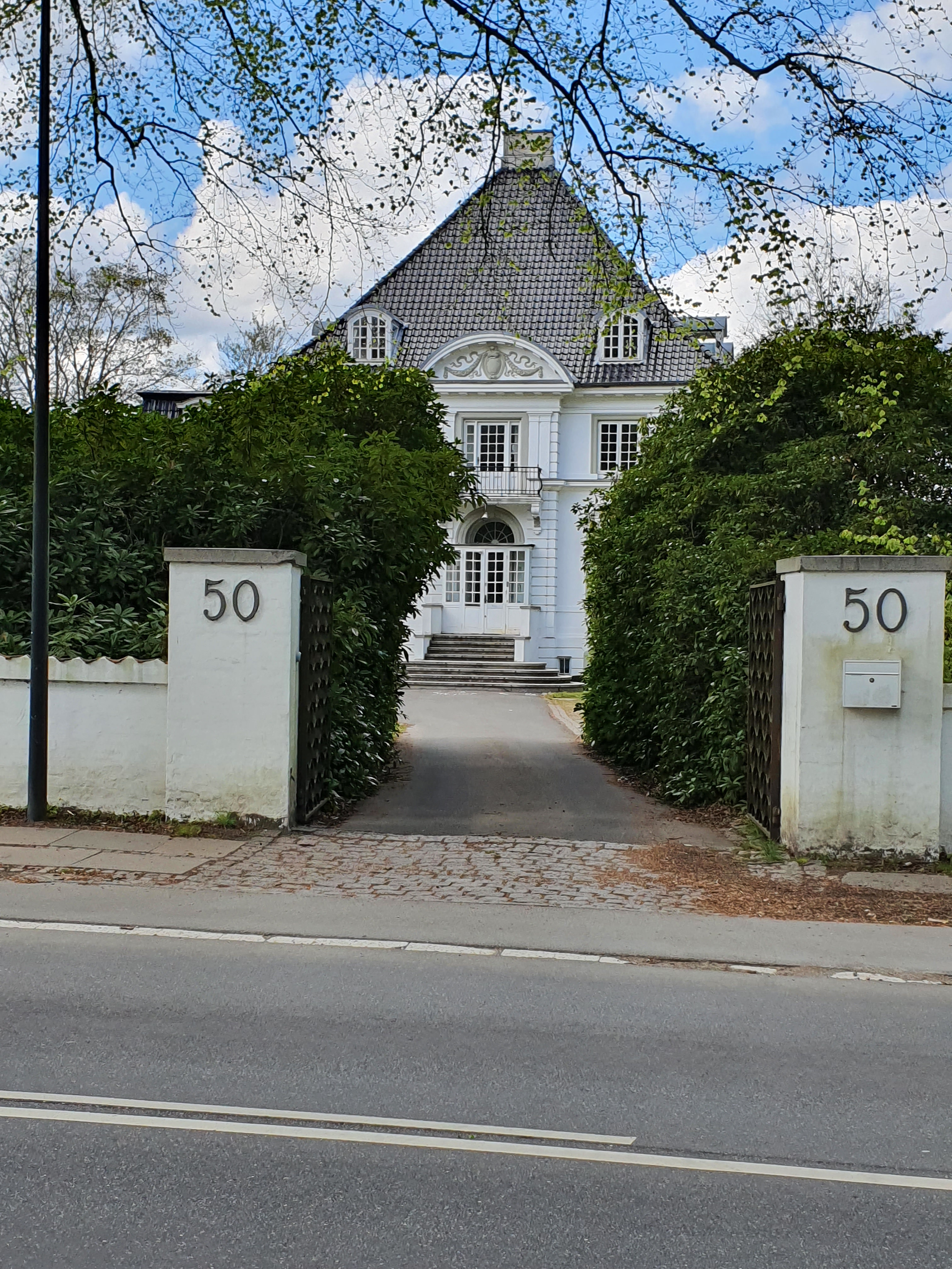 Klampenborgvej 50, 2930 Klampenborg